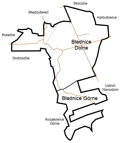 Sołectwo Bładnice w gminie Skoczów: drogi, kolej, Bładnice Dolne i Górne